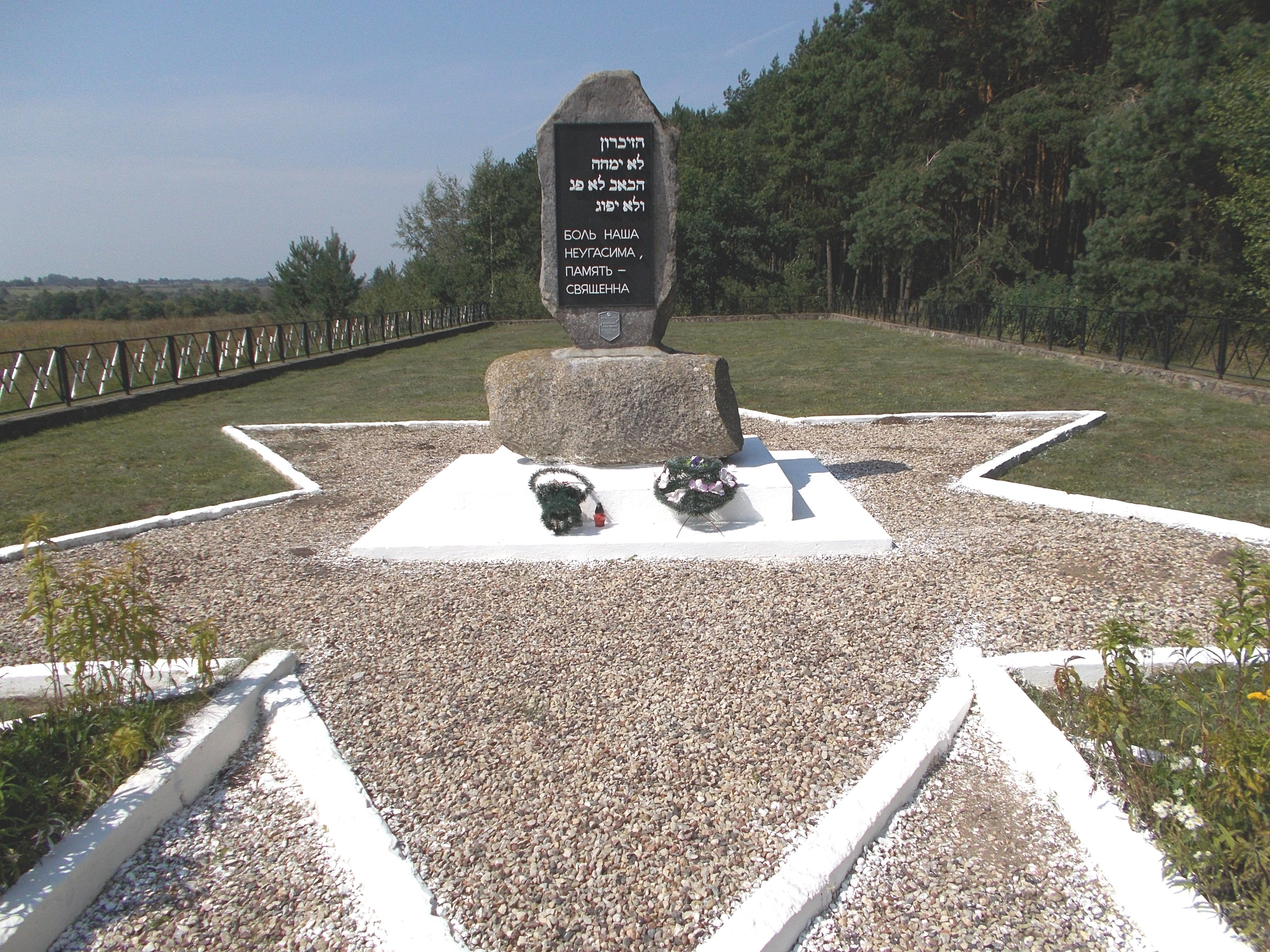 Глубокое Витебской области. Памятник убитым евреям - узникам гетто.